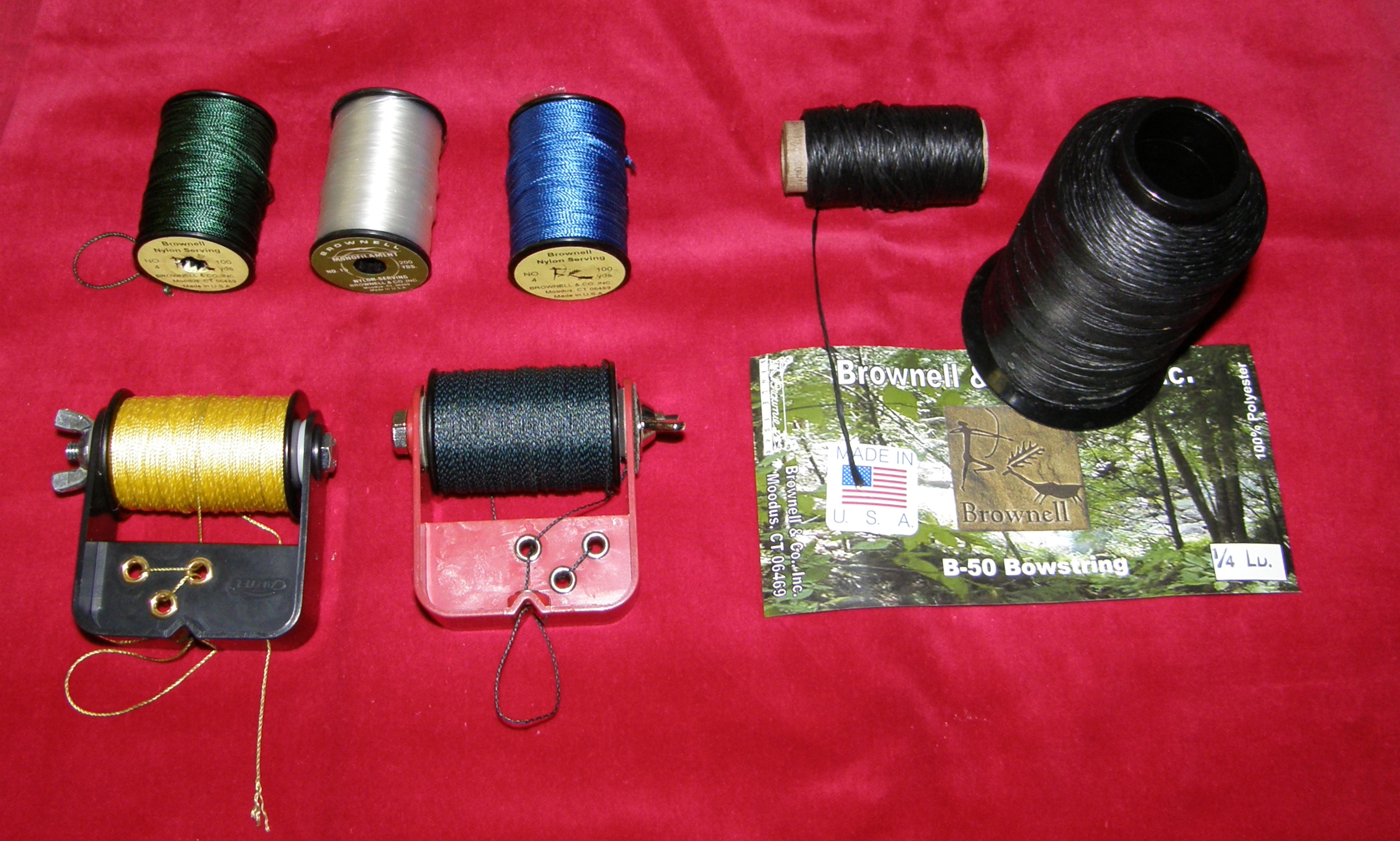 Sehnen- und Wickelgarn